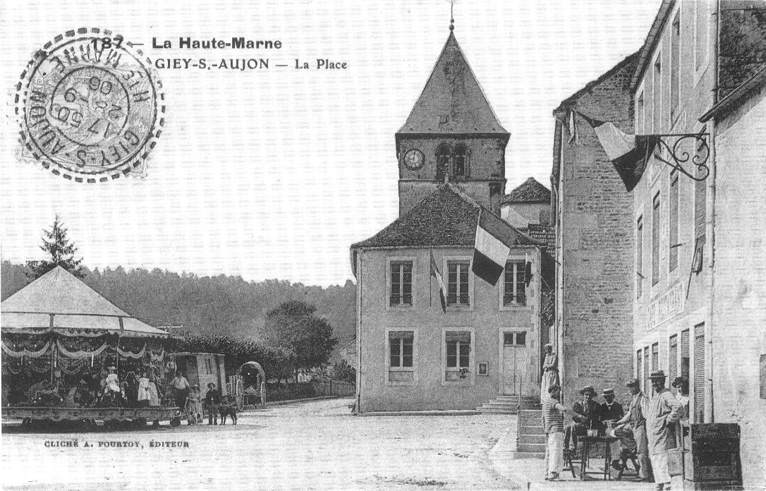 Carte postale ancienne La place de Giey-sur-Aujon, Haute-Marne, France.